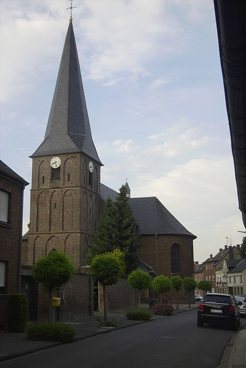 Summary Bildbeschreibung: katholische Kirche in Kückhoven ... Quelle: eigenes Foto Fotograf/Zeichner: bodoklecksel 16:41, 26. Jun 2006 (CEST) Datum: Juni 2006 Sonstiges